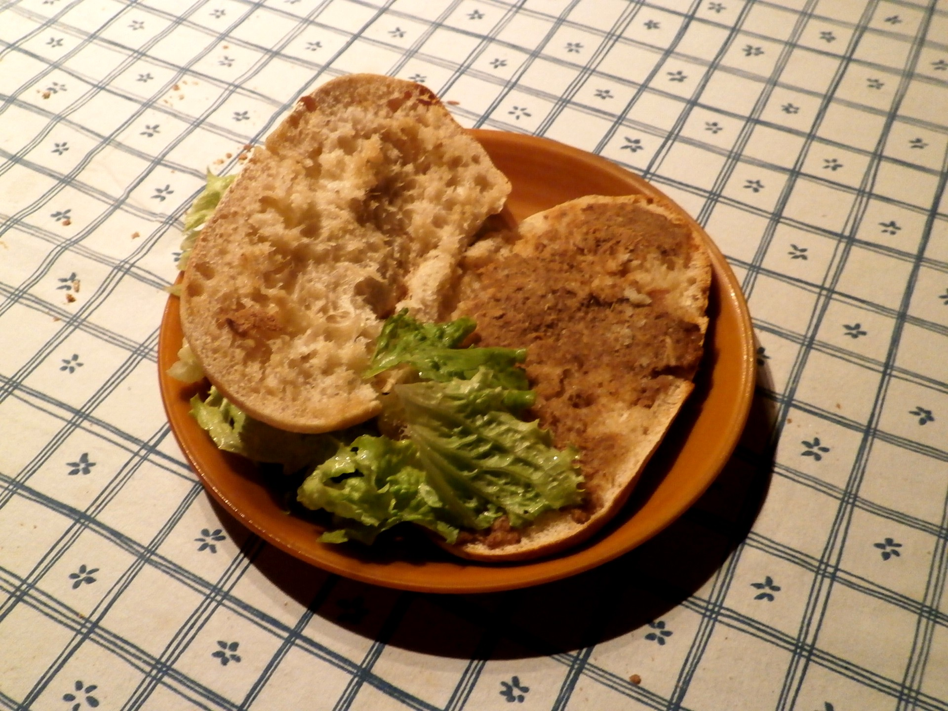 tartine de rillettes de Tours